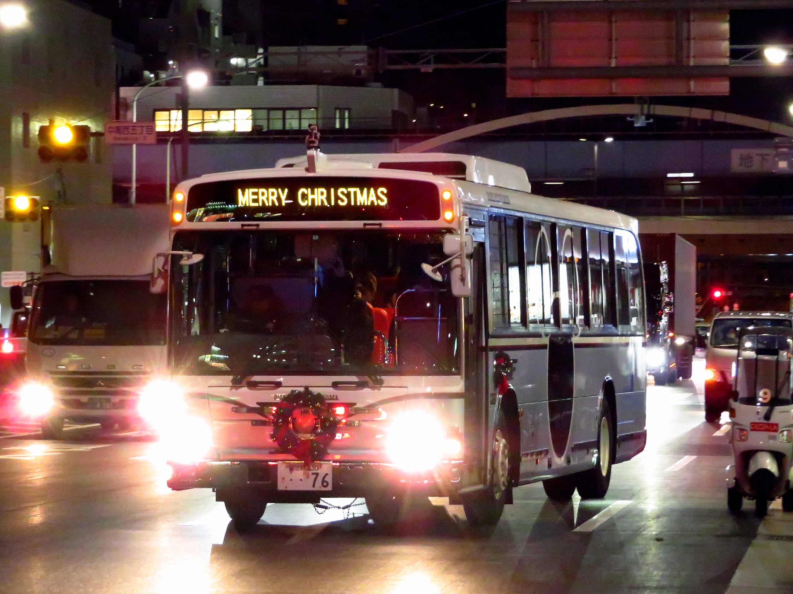 日野・ブルーリボンIIをベースにしたディズニーリゾートクルーザー。オフィシャルホテルでは宴会客送迎のため大型車もベース車に選定されるようになった。サンルートプラザ東京所属車両。 型式：KV234N3（推定） 登録番号：習志野230さ・・76 撮影地：東京都江戸川区東葛西、葛西駅付近 Canon PowerShot SX720 HS